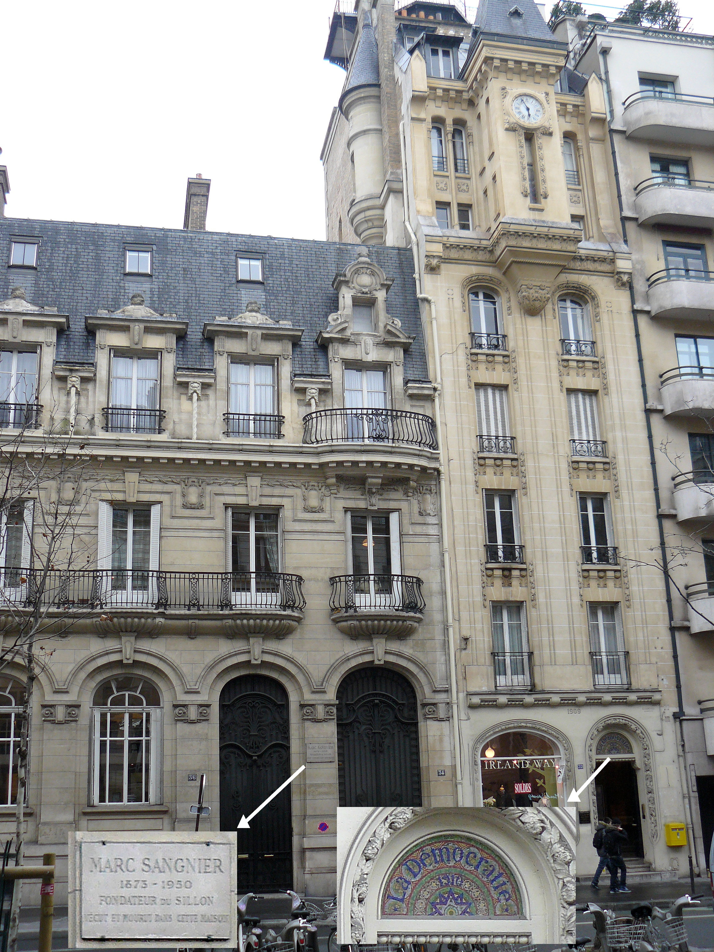 Maison du 34, boulevard Raspail (7e arrondissement de Paris) où vécu Marc Sangnier, journaliste et homme politique (1873-1950), et immeuble du 32 qui abrita le journal de Marc Sangnier "La Démocratie" au début du XXe siècle. Plaque sur le mur au 34, reste de l'enseigne du quotidien au 32.